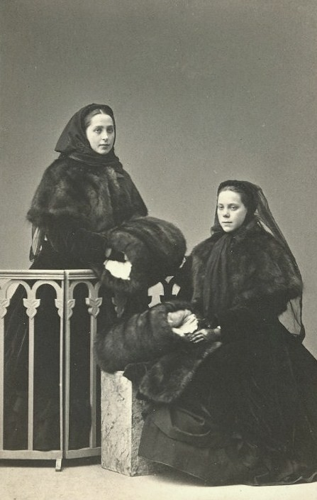 Александра Алексеевна Чичерина (1845-1920) и её сестра Мария Алексеевна Кочубей (1848-1917), дочери Алексея Васильевича Капниста.